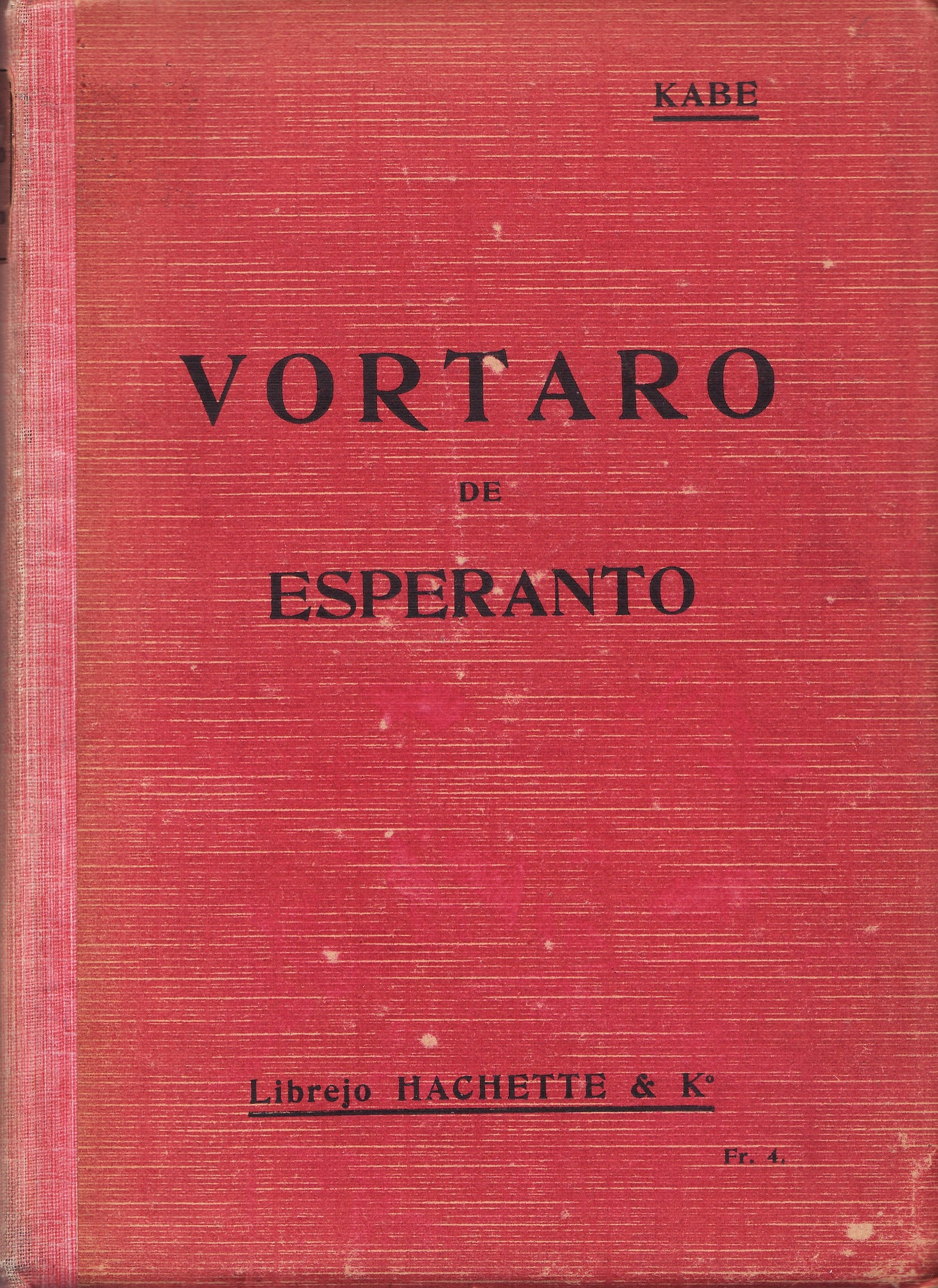 kovrilo de "Vortaro de Esperanto", 1911